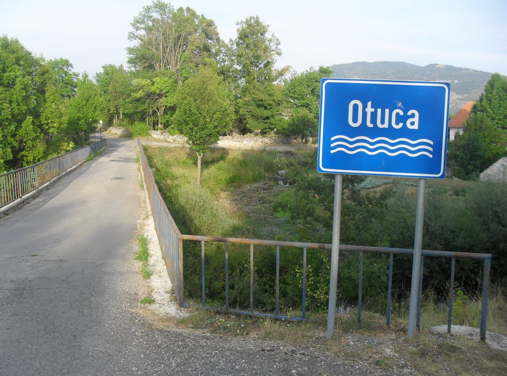 Ријека Отуча у Дерингају, Лика.